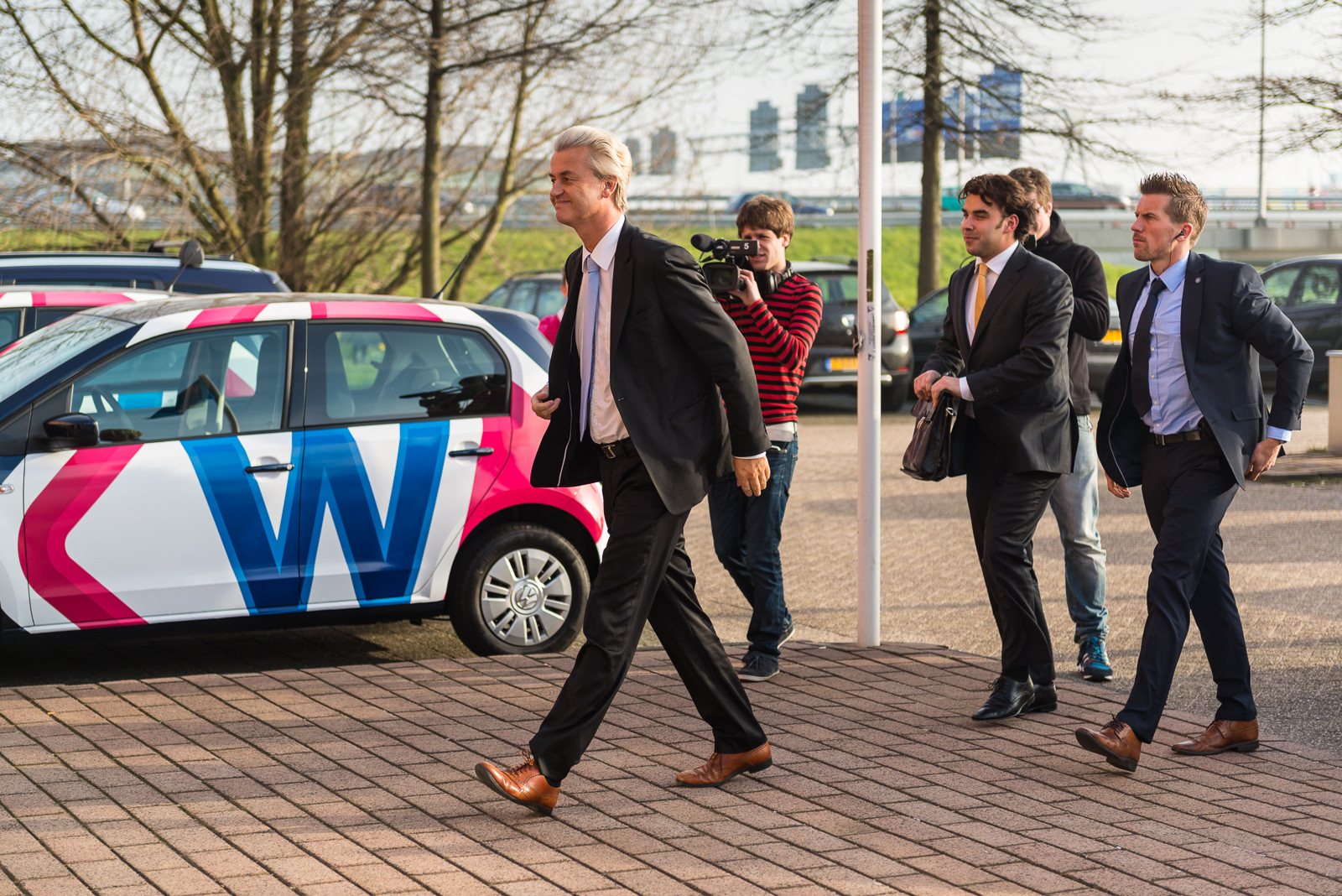 TV West